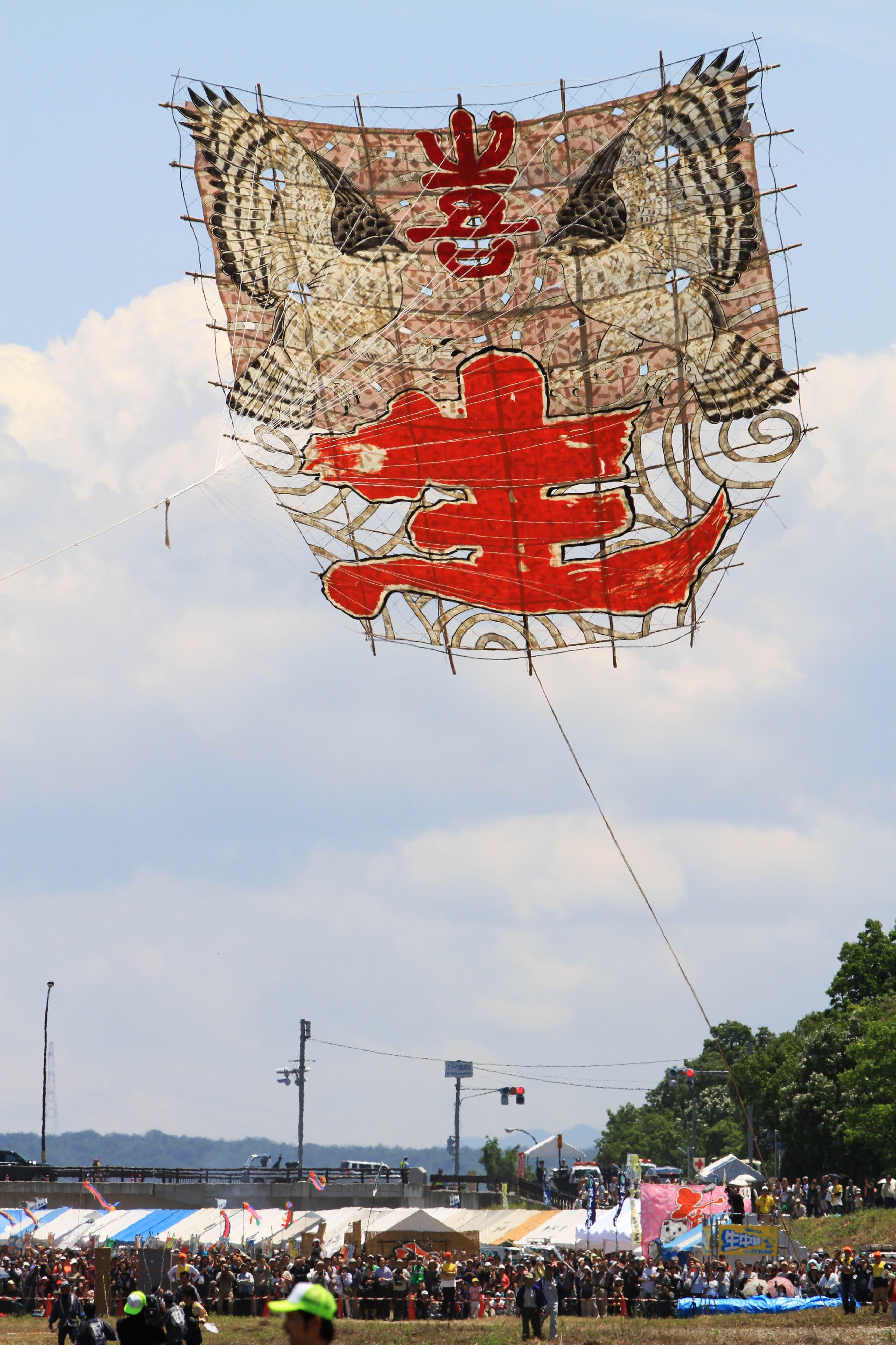 八日市大凧まつり (滋賀県東近江市建部北町・愛知川河川敷)